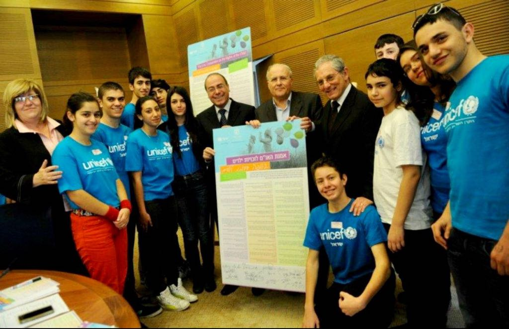 מוריאל מטלון במעמד החתימה על האמנה לזכויות הילד בכנסת